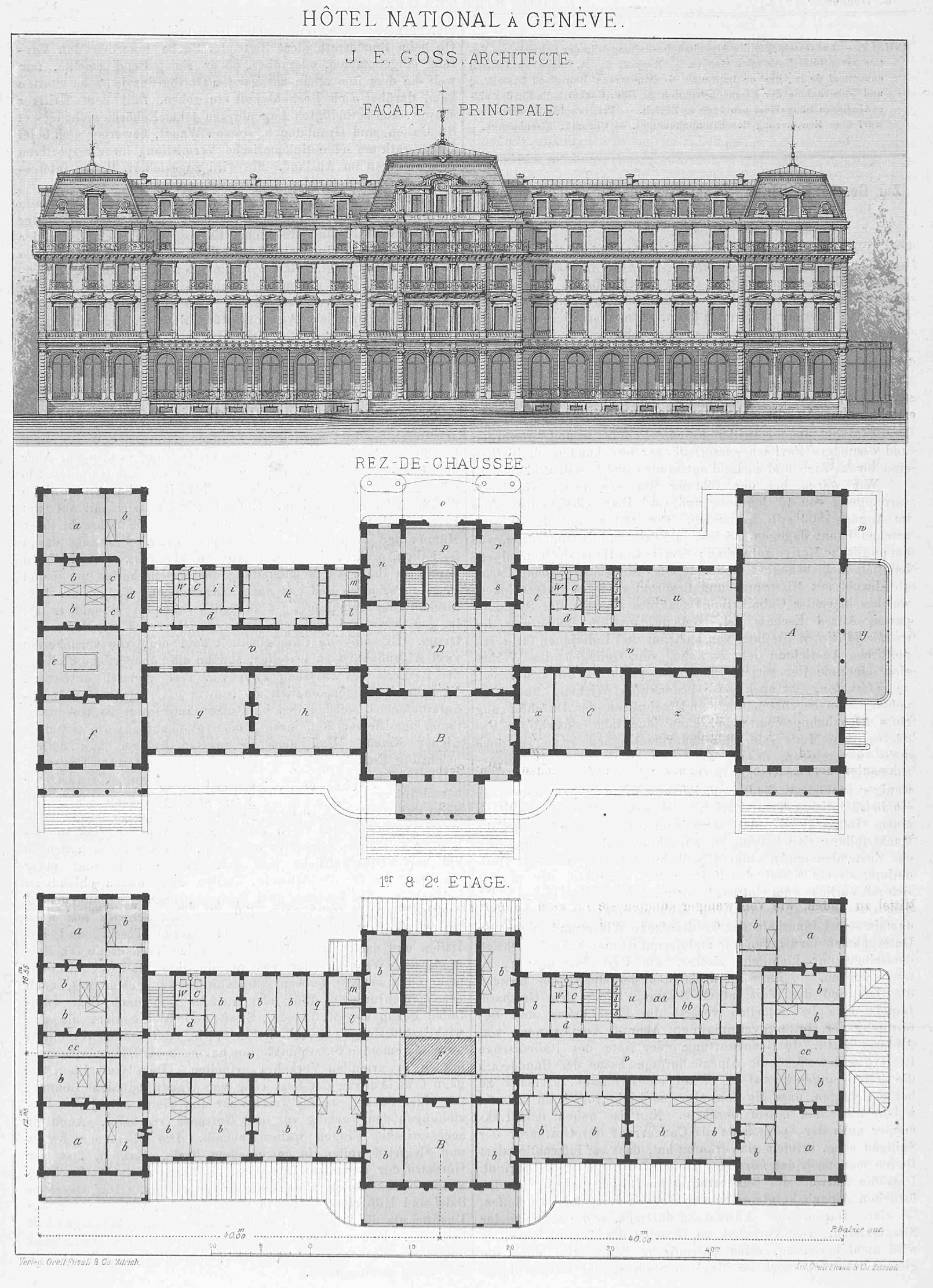 Hôtel National, Genf, erbaut 1875–76. Hauptfassade, Grundriss Erdgeschoss, Grundriss Normalgeschoss. Architekt: Jacques-Elysée Goss. Heute Palais Wilson, Sitz des UNHCR.